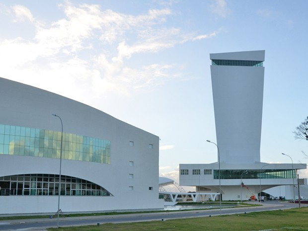 Teatro Pedra do Reino - João Pessoa - PB